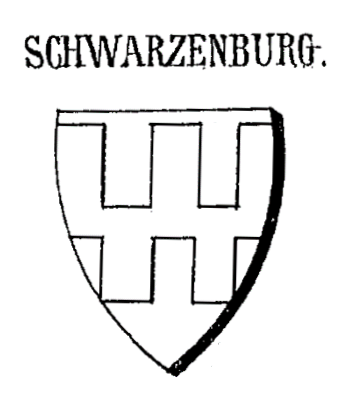 Wappen der Schwarzenburger (Rötz)